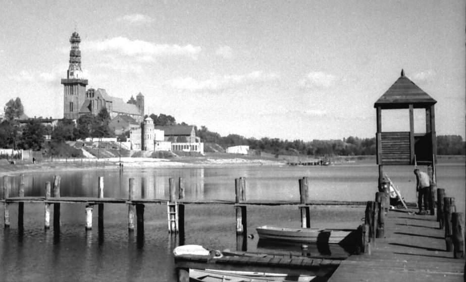 Chełmża - odbudowa wieży kolegiaty podjęta w 1969 roku. Autor:Władysław Goliński